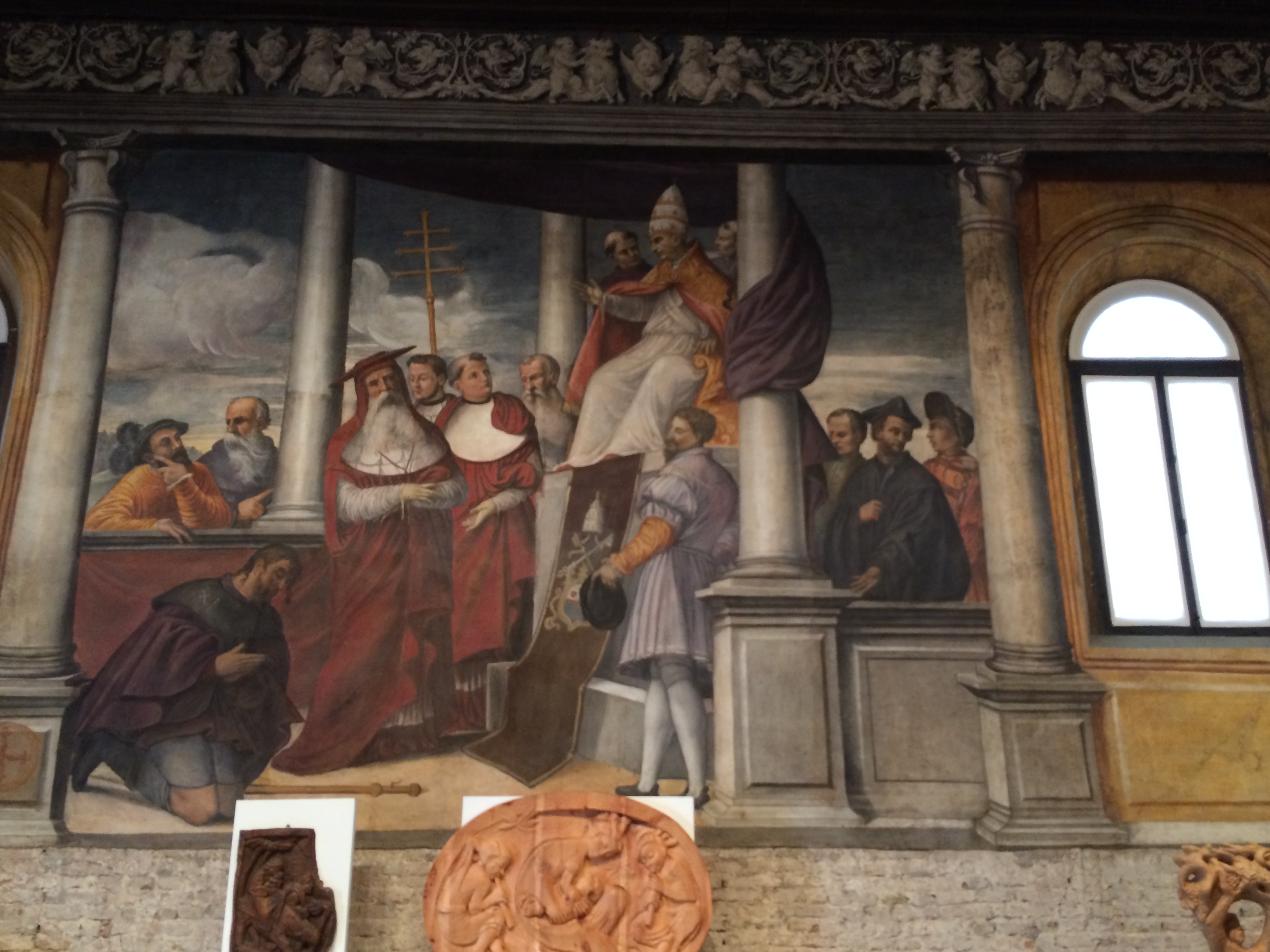 Padova - Oratorio San Rocco